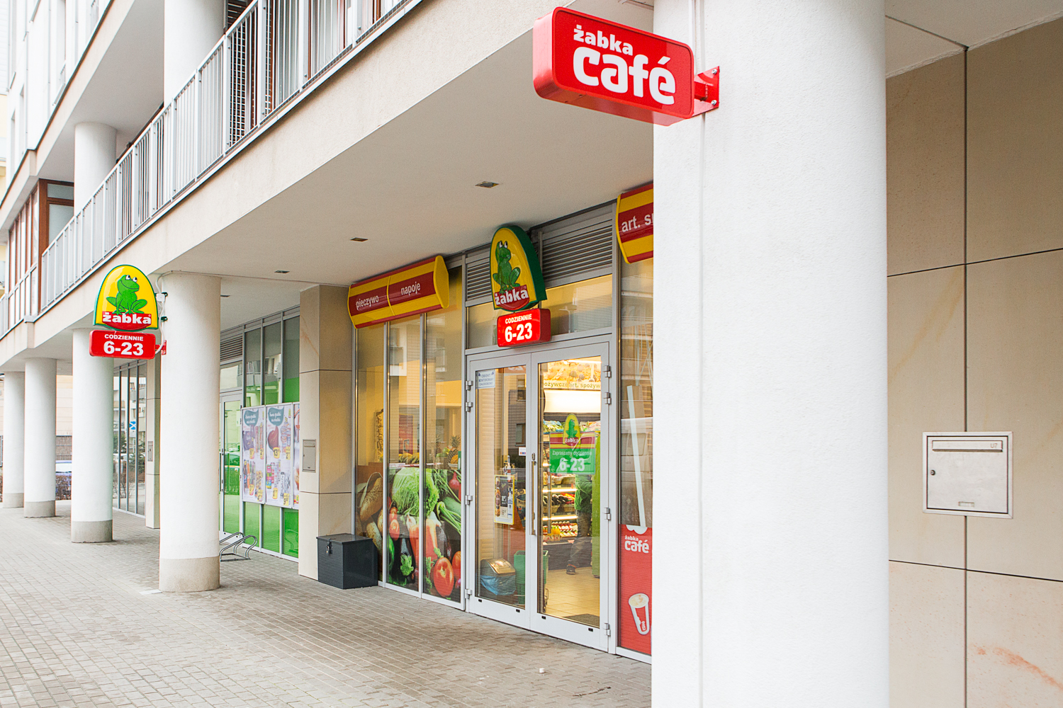 shop belonging to Żabka